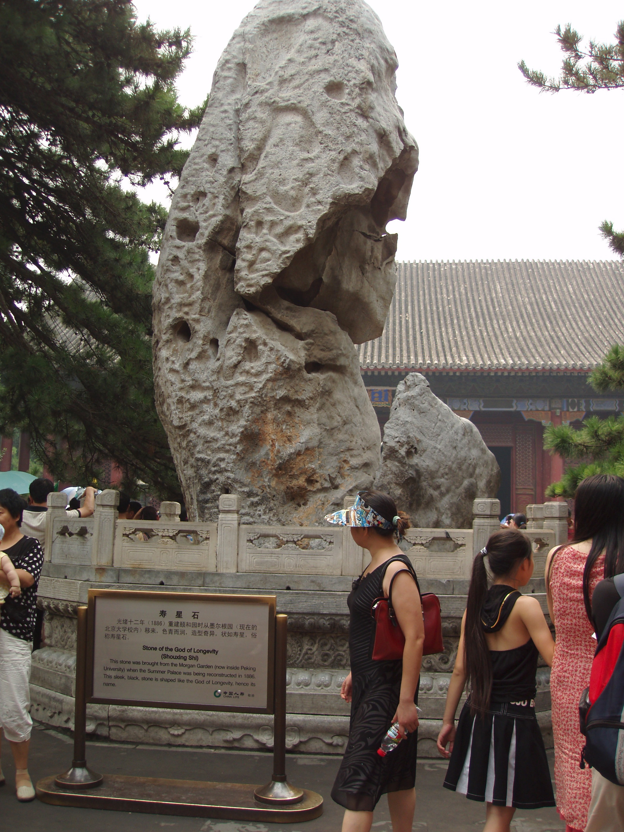 頤和園壽星石。